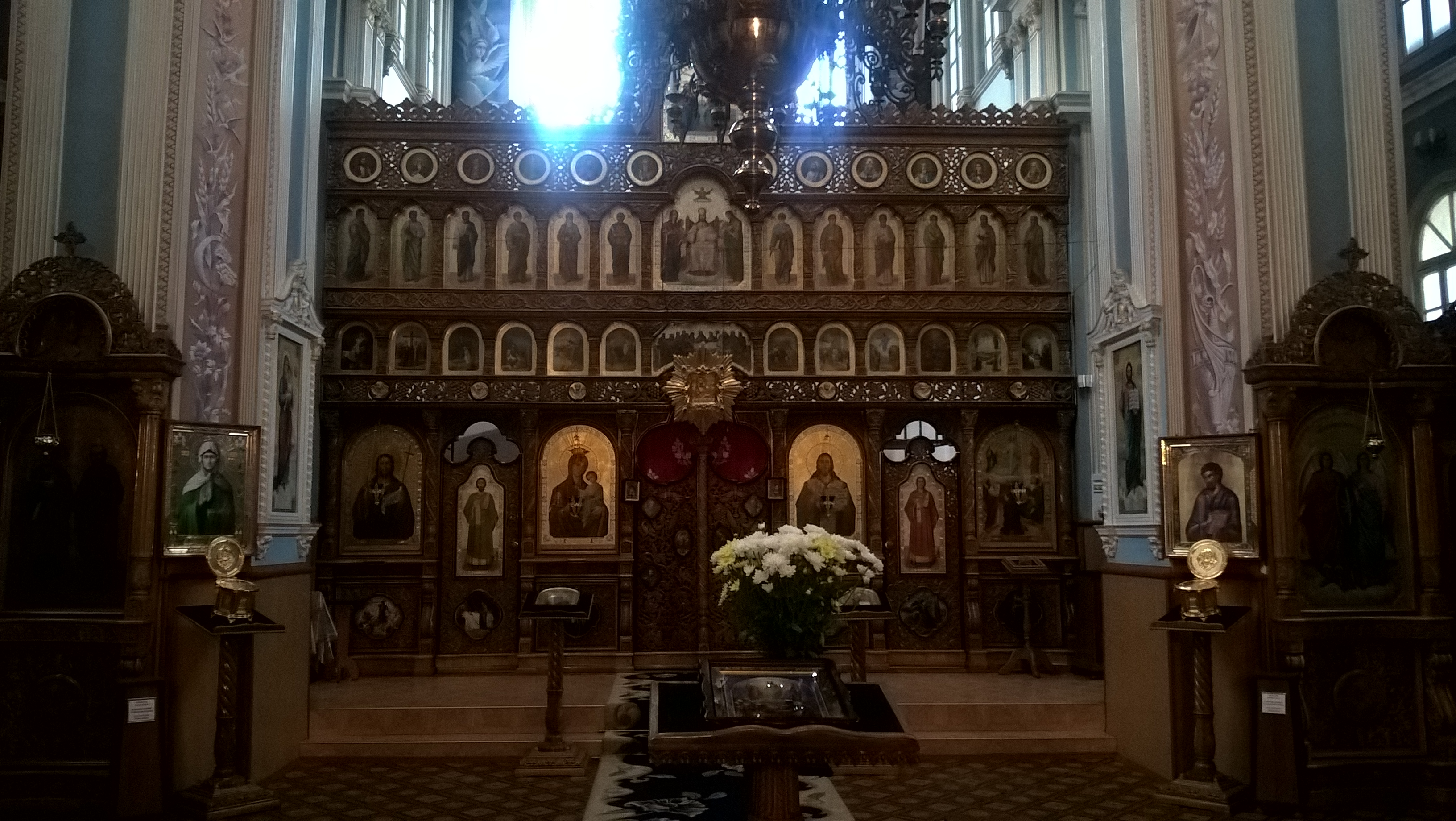 Ikonostas w cerkwi Przemienienia Pańskiego w Kiszyniowie